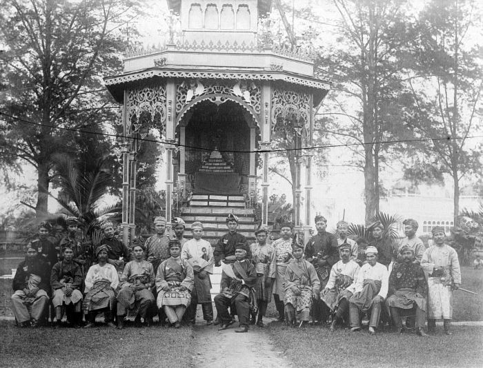 Negatief. Aan het hof van de Sultan van Deli te Medan (Sumatra) wordt de geboorte van prinses Juliana afgekondigd